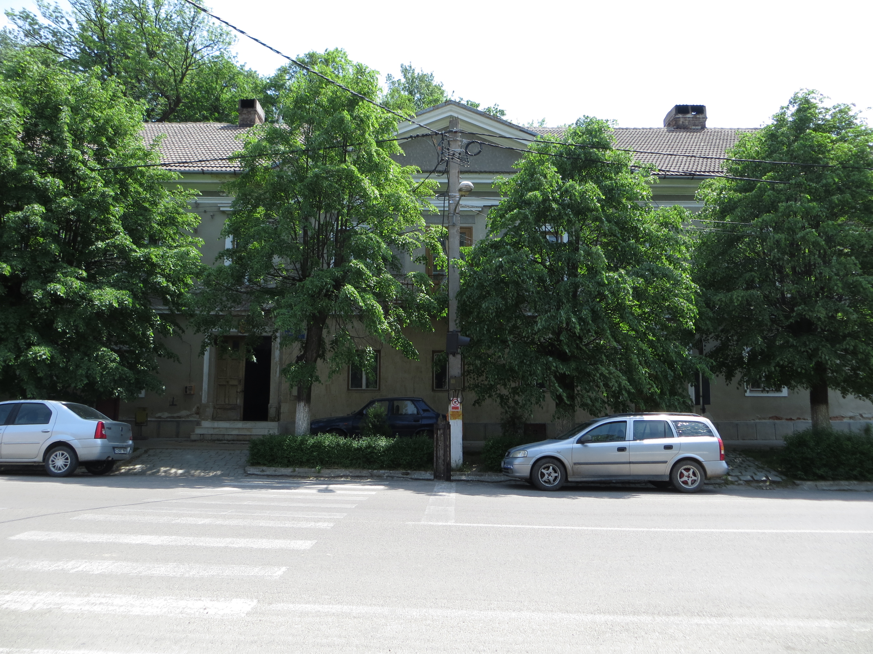 Tribunal, azi Judecătoria Oravița și birou carte funciară